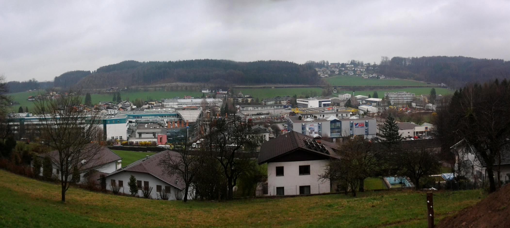 Gewerbegebiet Kasern, Ortsteil von Bergheim (Land Salzburg), im Vordergrund: Häuser von Radeck; beides gehört zum Bergheimer Ortsteil Radeck-Kasern. Ganz rechts: Teil des Salzburger Stadtteils Kasern. Rechts im Hintergrund: Berg, ein Ortsteil der Gemeinde Hallwang.